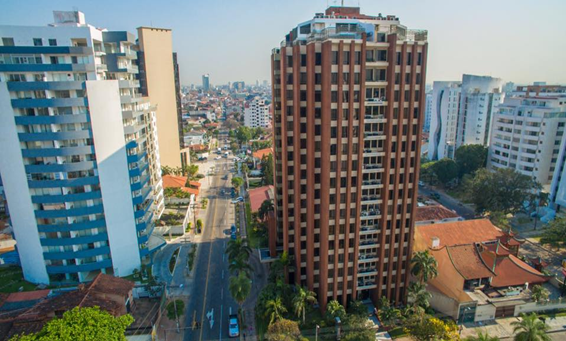 Edificios de Santa Cruz